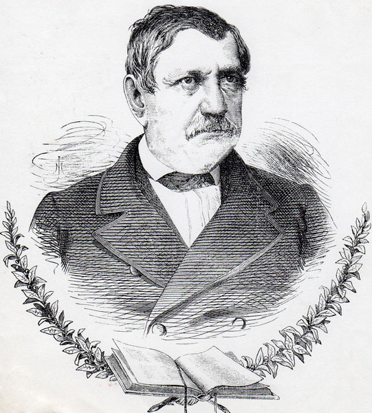 Јован Гавриловић, политичар (1796-1877)